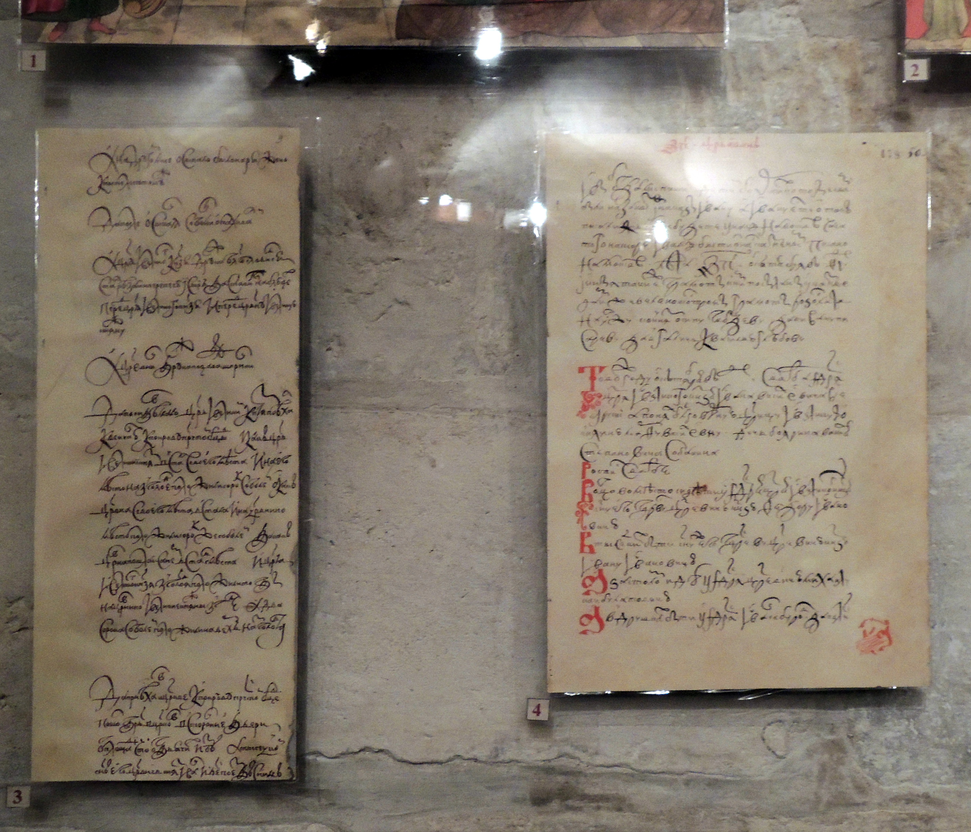 3. Страница из чина свадьбы Ивана Грозного с Анной Васильчиковой (1575). 4. То же - с Марфой Собакиной (1571). Копия